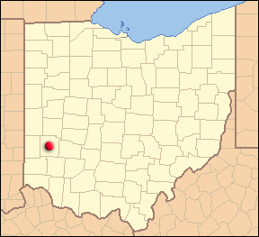 Localización de Dayton en Ohio